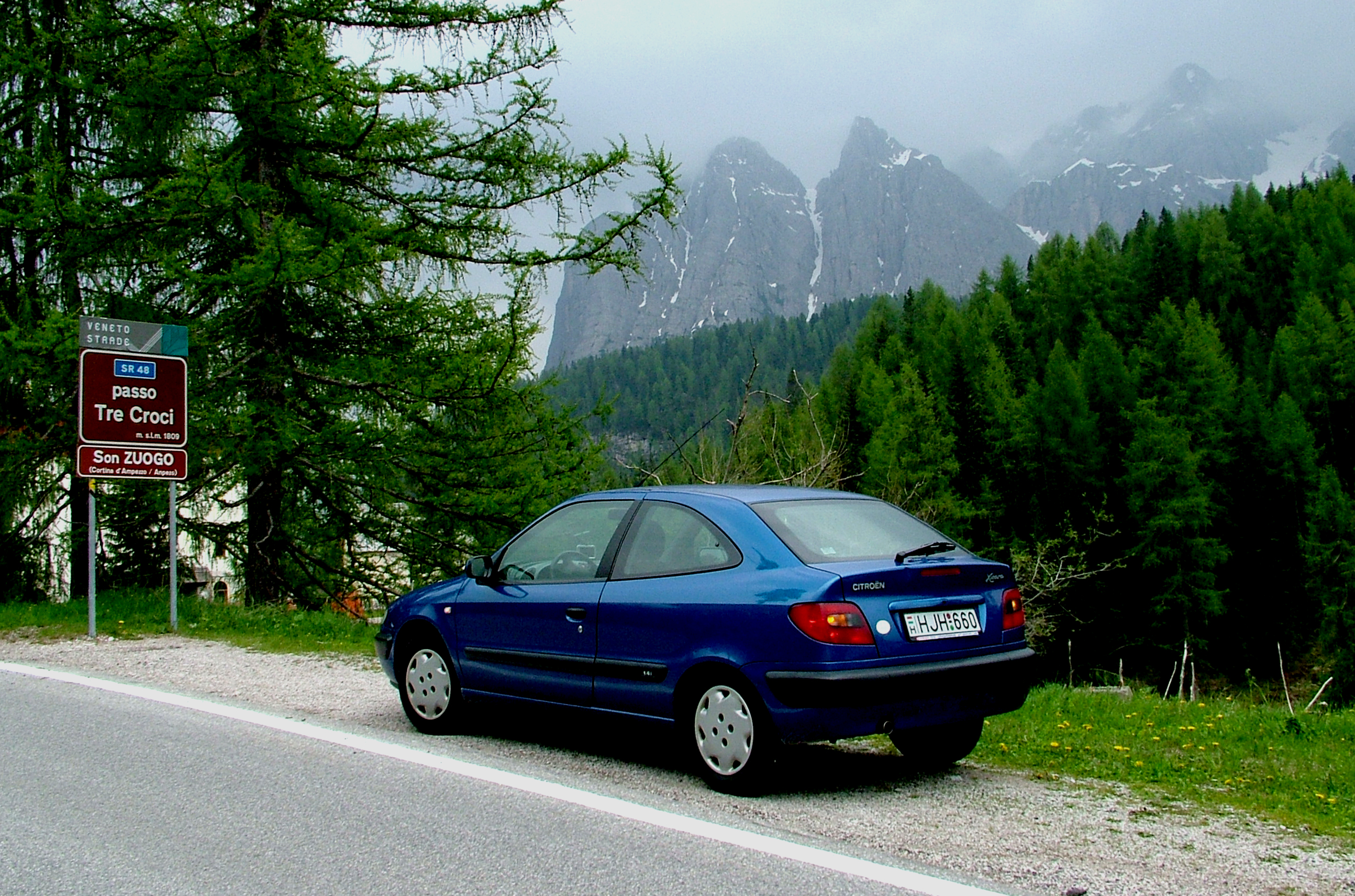 Dolomitok: Tre Croci-hágó (2010), Olaszország